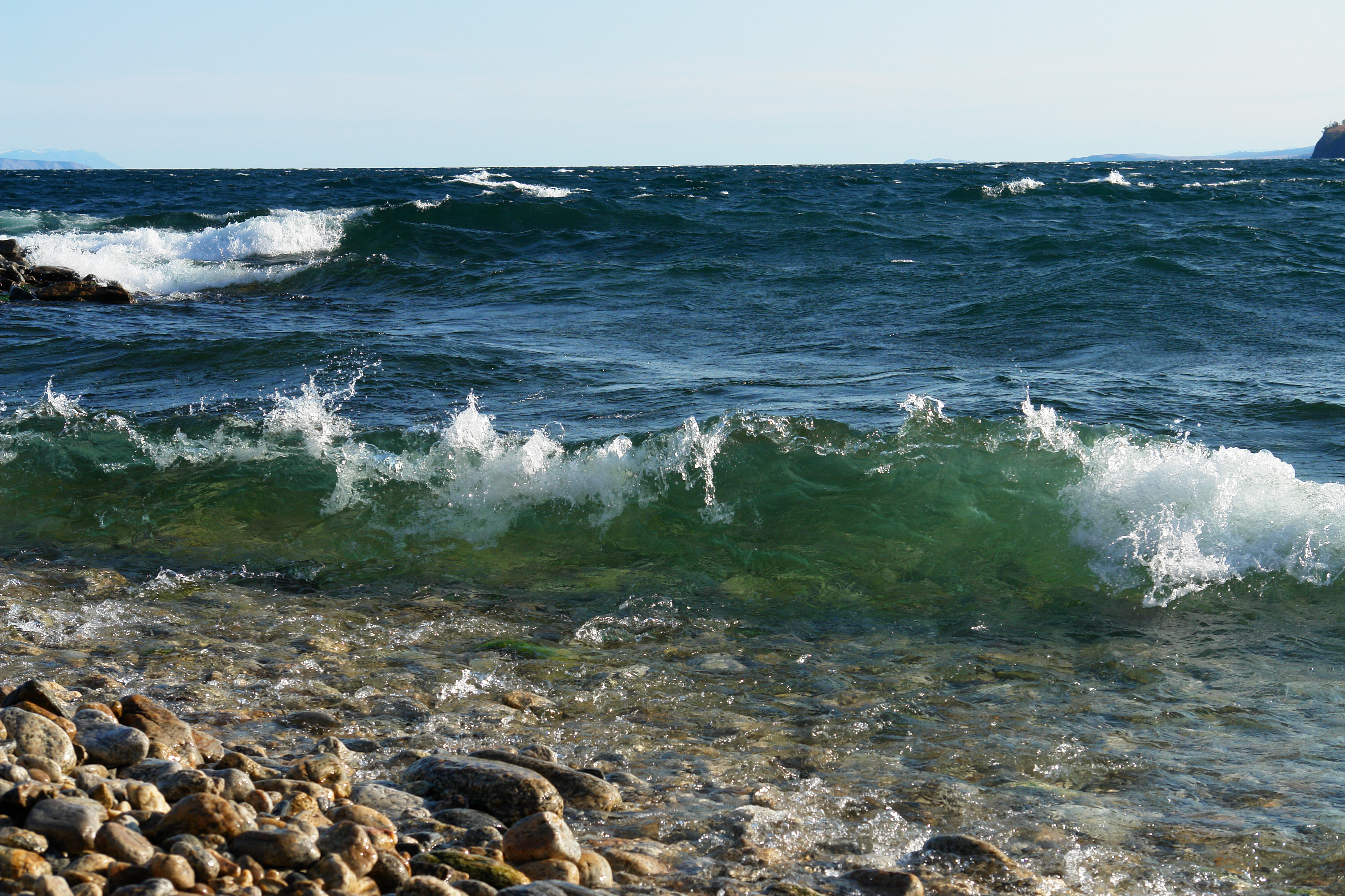 "Цвета морской волны".